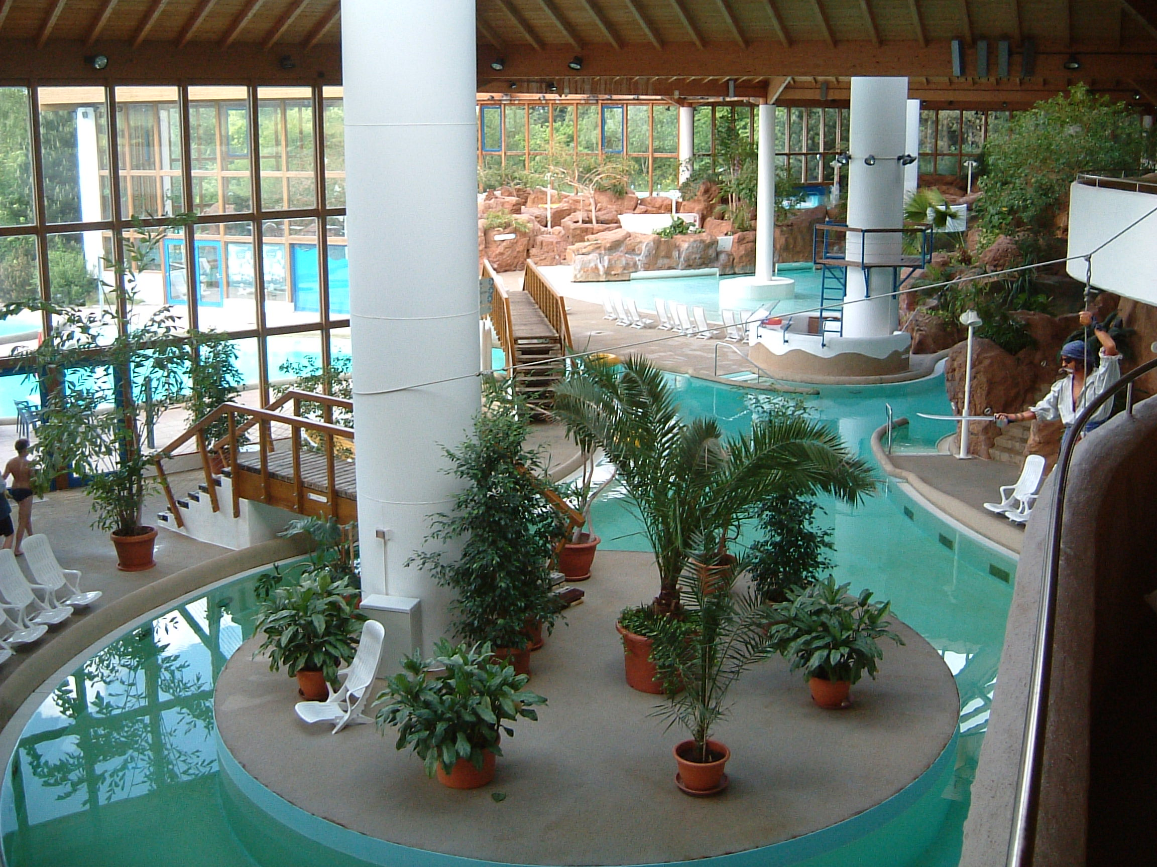 Innenansicht des Freizeitbades Bergische Sonne in Wuppertal